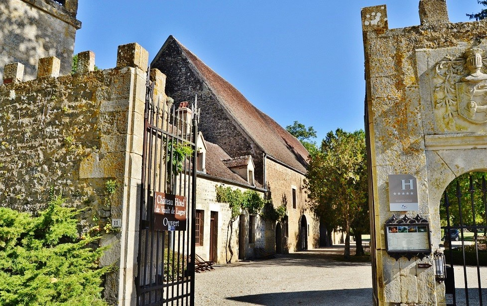 Le Château